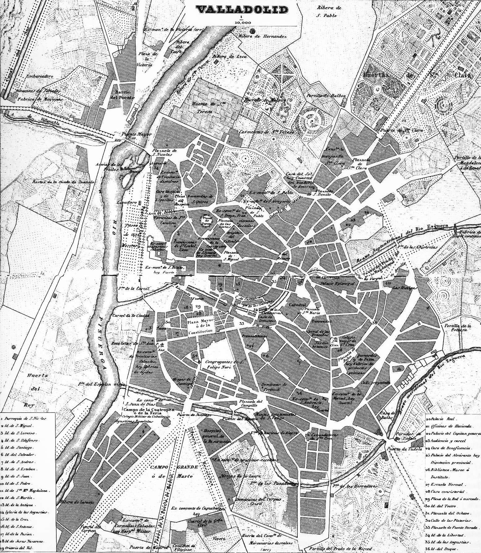 Plano de Valladolid 1852